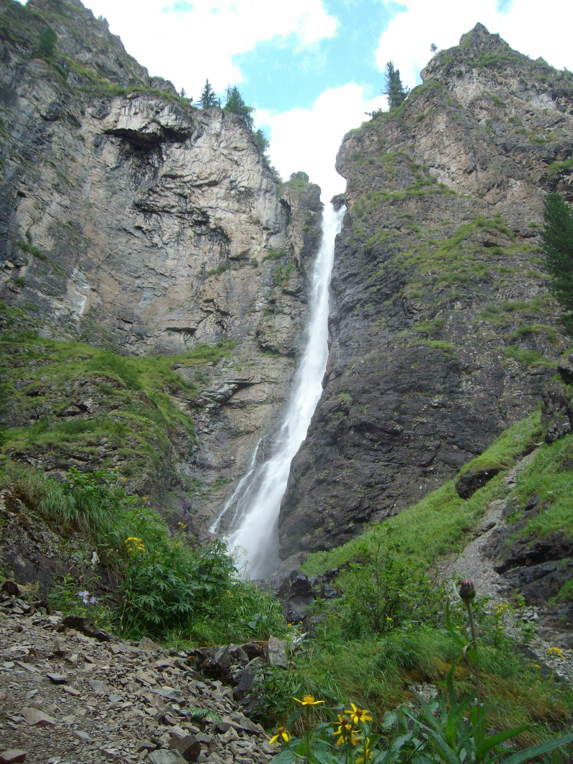 Крупнейший из водопадов на реке Шинок, Солонешенский район, Алтайский край